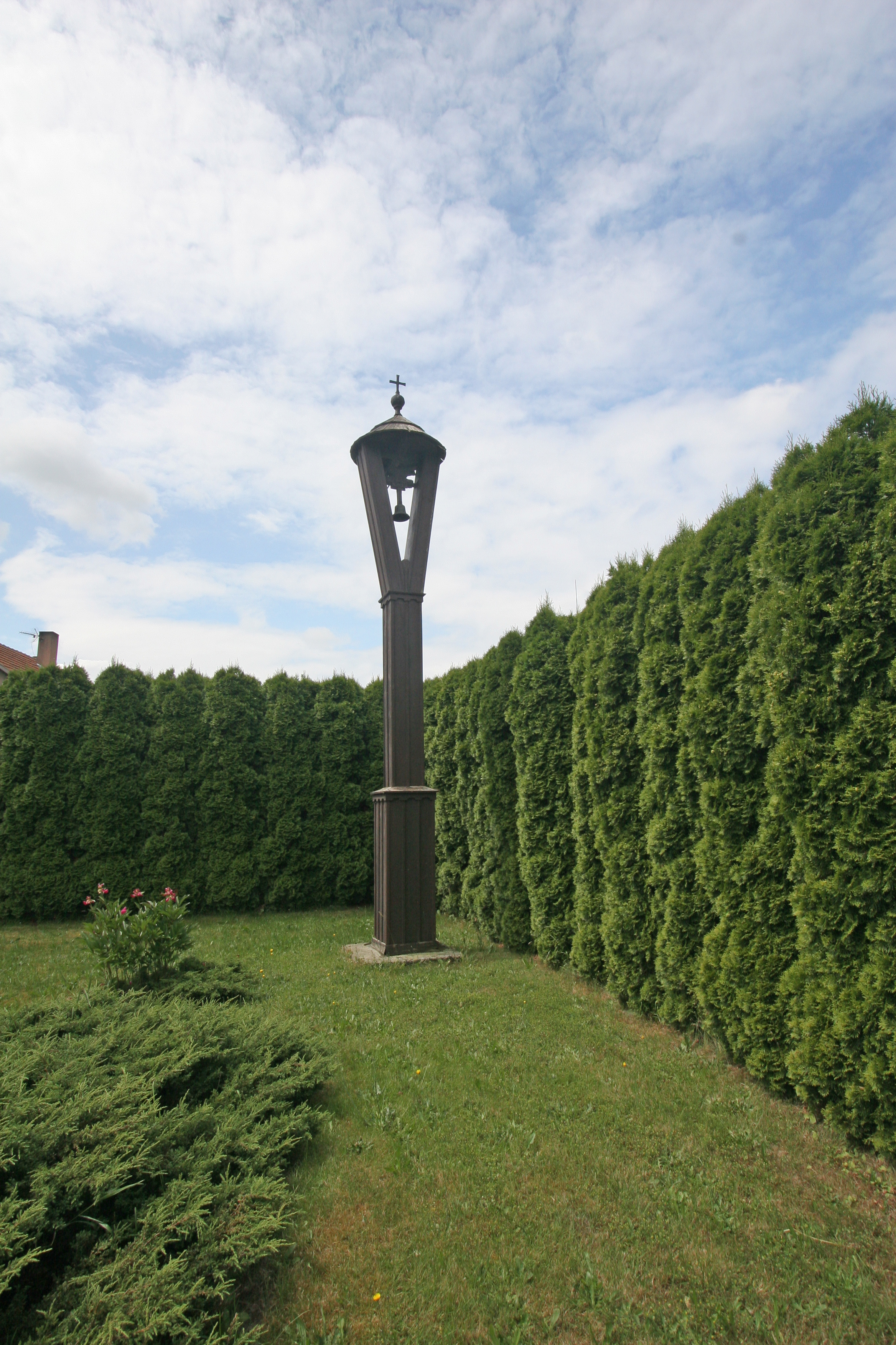 Časy zvonička